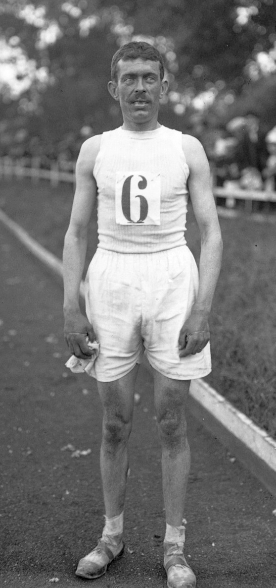 26-5-12, Colombes, Pauteix [vainqueur des éliminatoires olympiques français du marathon] : [photographie de presse] / [Agence Rol]